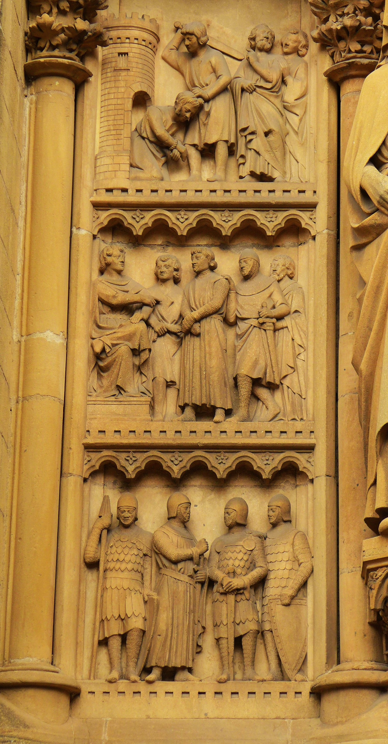 Das Martyrium des heiligen Livarius, Bildhauer Auguste Dujardin nach Entwürfen von Conrad Wahn, Segolenakirche Metz